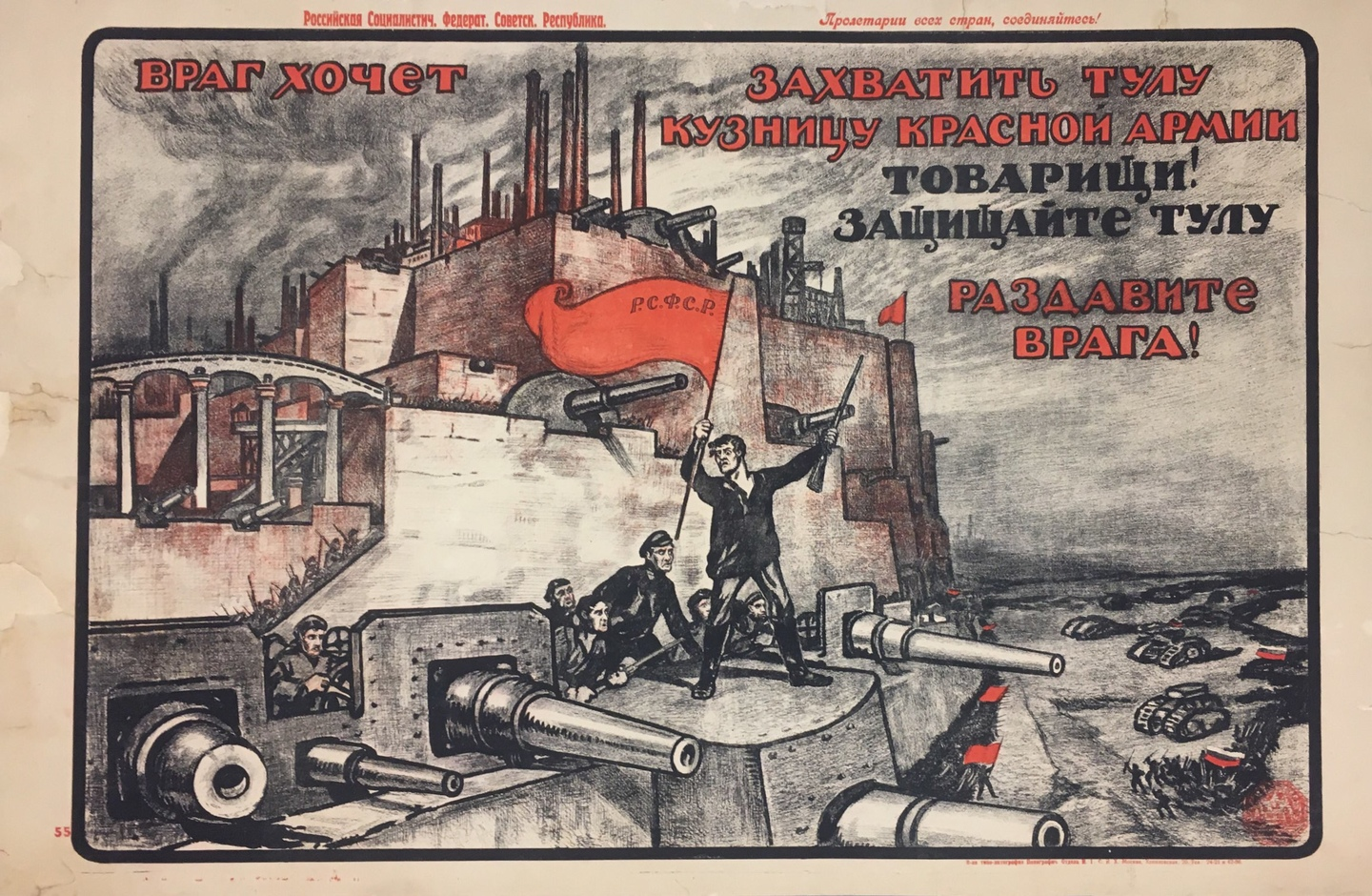 Враг хочет захватить Тулу - кузницу Красной Армии. Товарищи! Защищайте Тулу. Раздавите врага.jpg